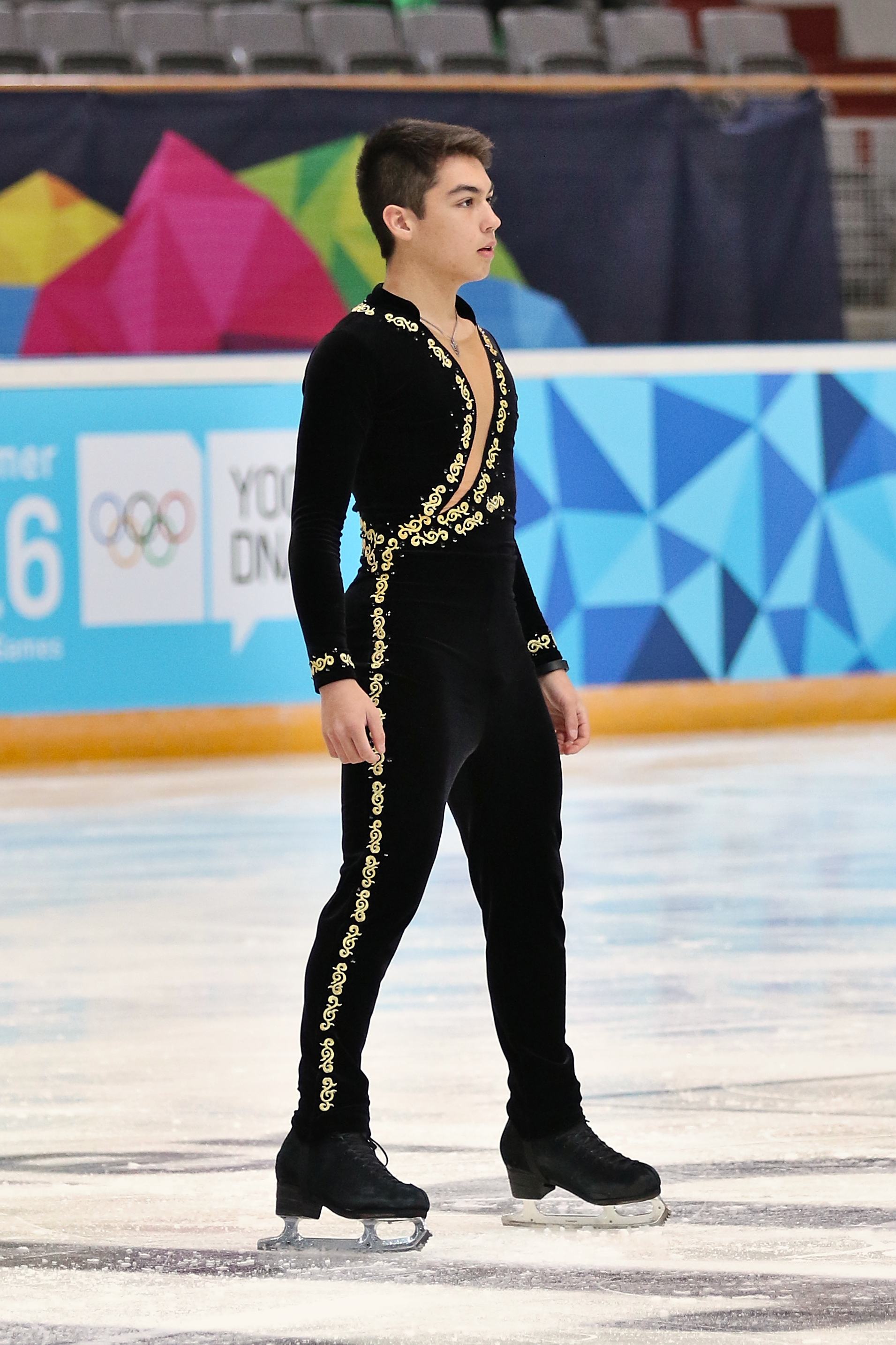 Lillehammer 2016 - Figure Skating Men Short Program - Camden Pulkinen